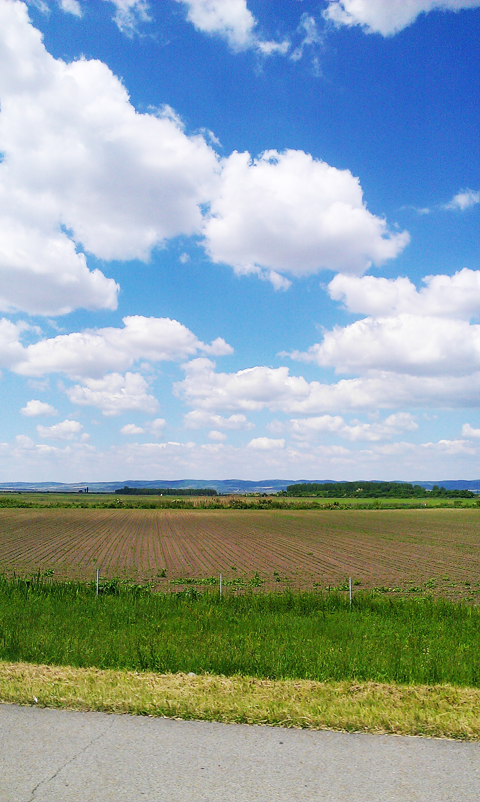 Negde na putu ka Prijedoru...